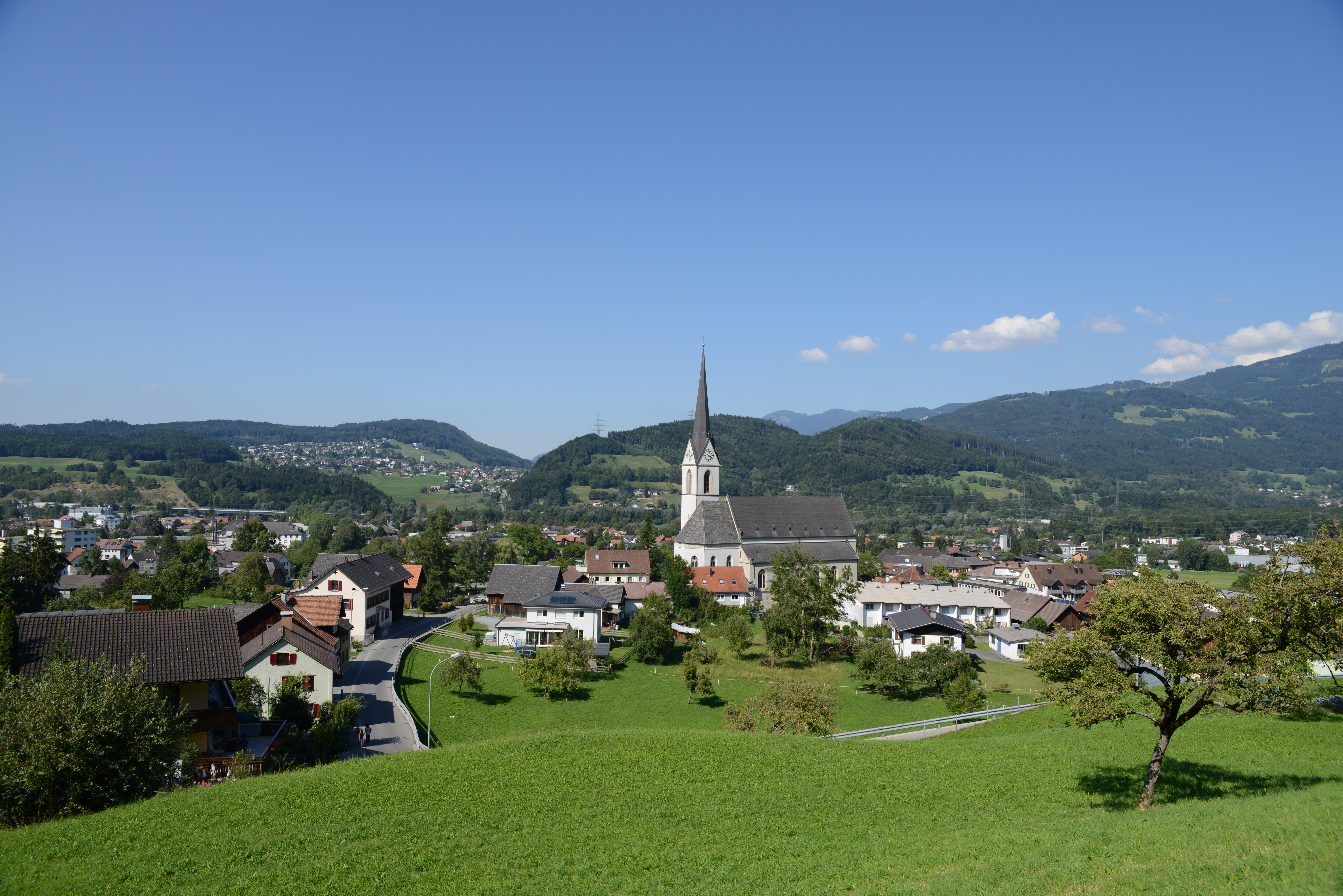 Pfarrkirche hl. Sulpitius in Frastanz.